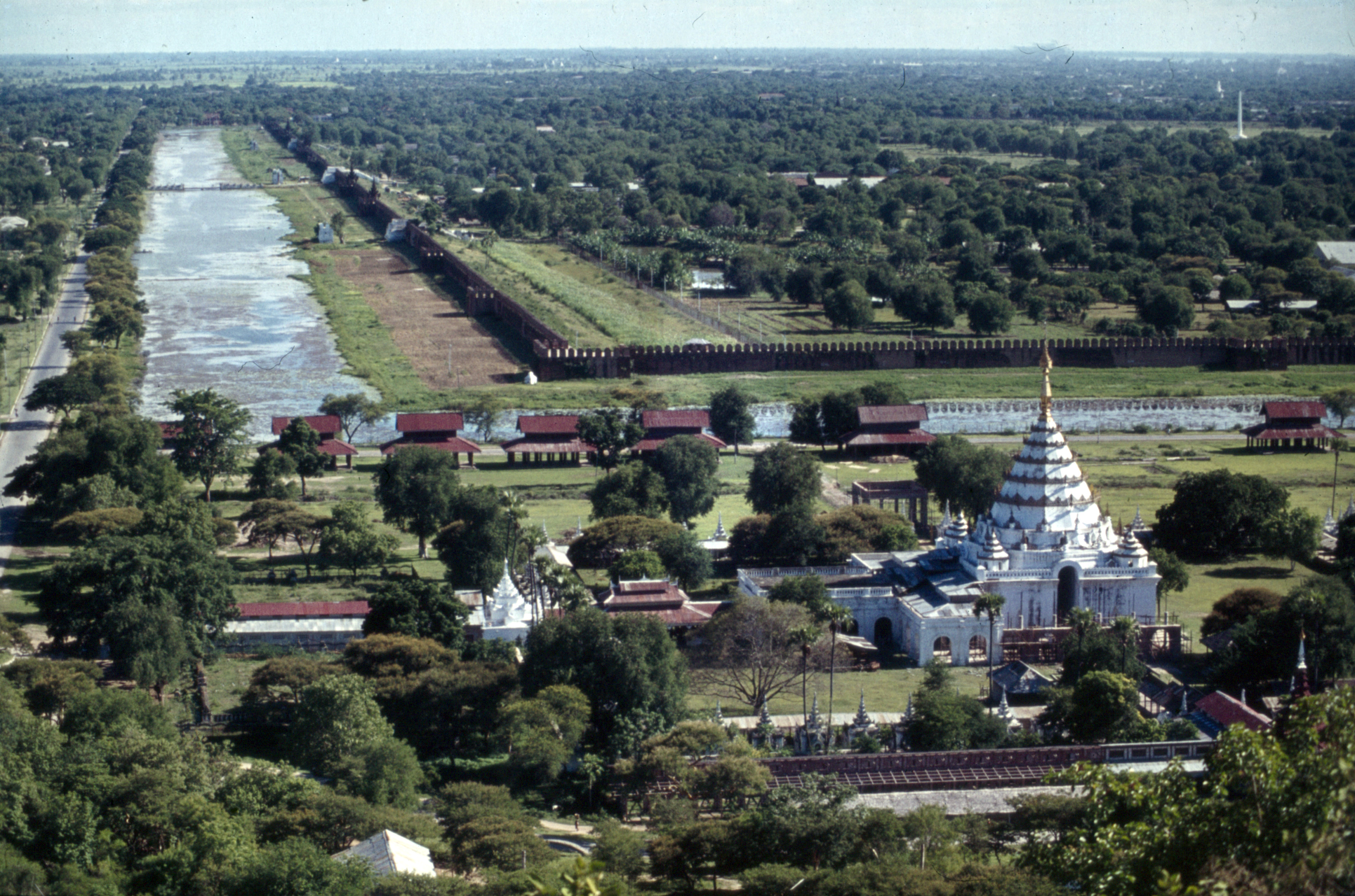 Mandalay-Hill in Myanmar 1976.